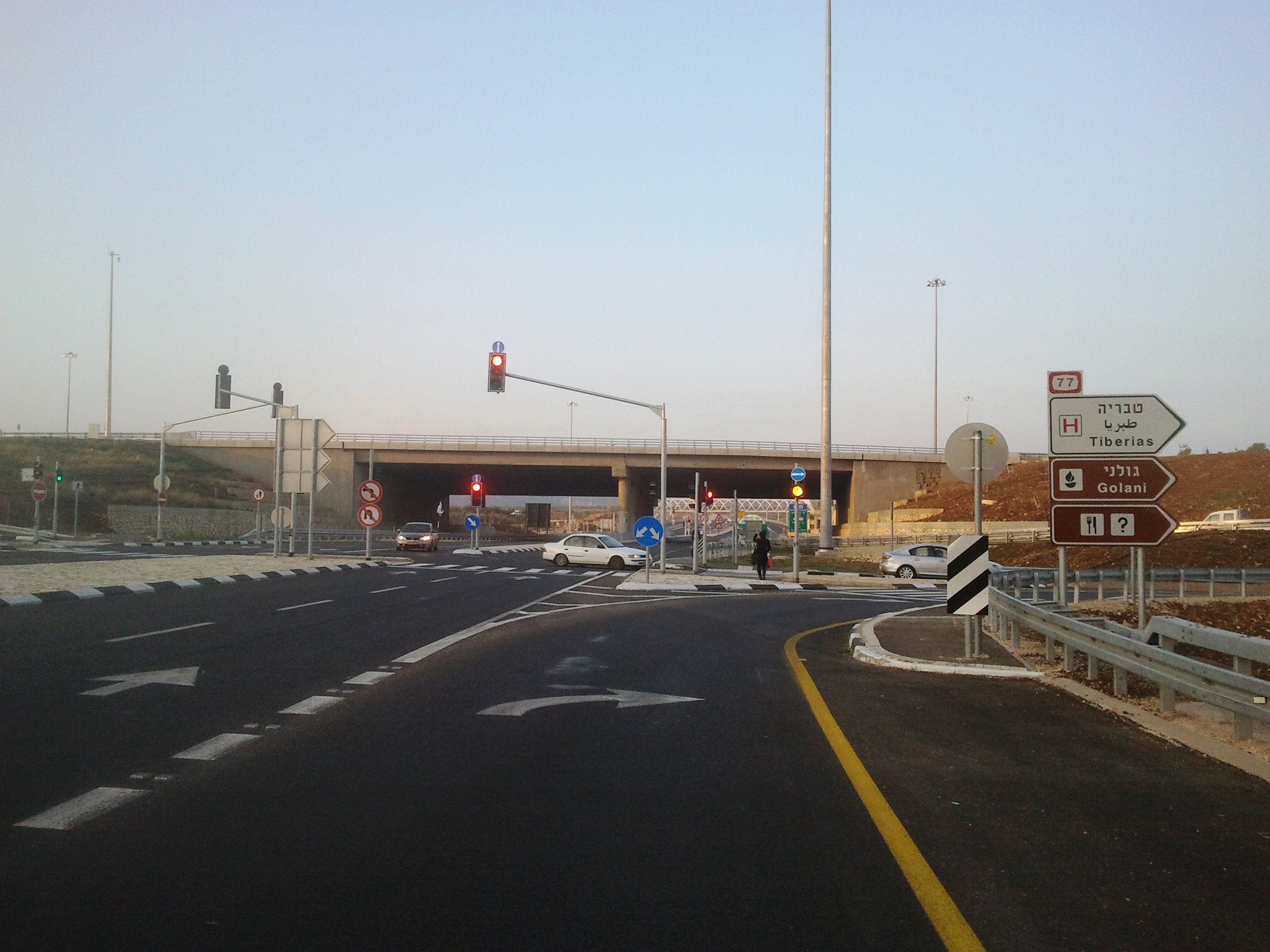 מחלף גולני הוא מחלף מרכזי בגליל התחתון, שבו נפגשים כביש 65 המוביל מעפולה לאצבע הגליל וכביש 77 המוביל מטבריה למחלף המוביל.